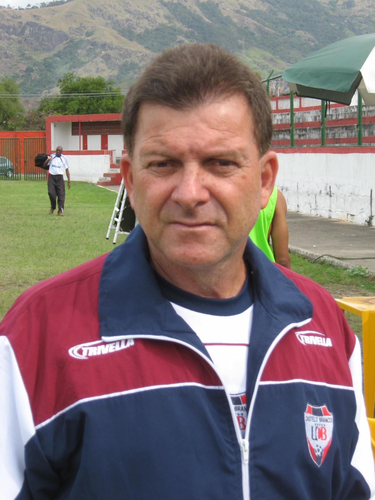 Técnico Paulo César, do Clube Atlético Castelo Branco